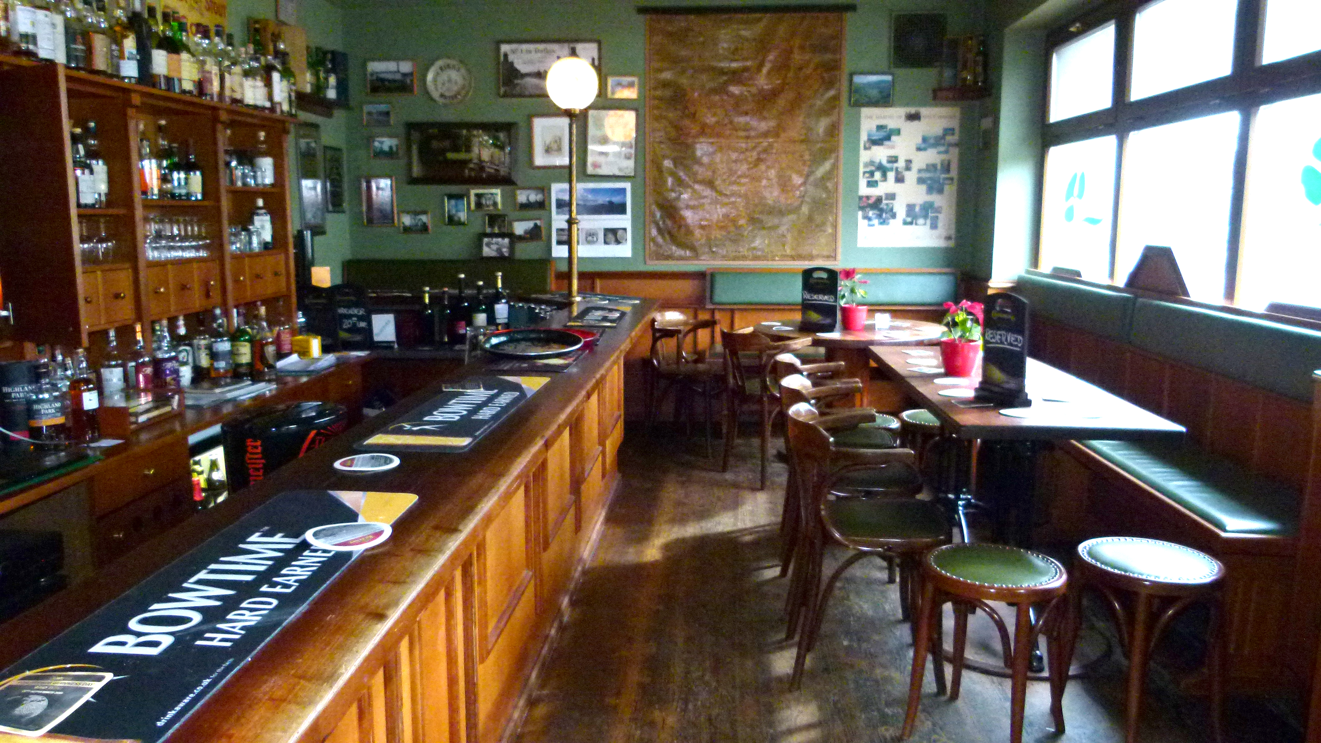 Paddy Foley's Irish Pub in Striesen, Schandauer Straße, Dresden